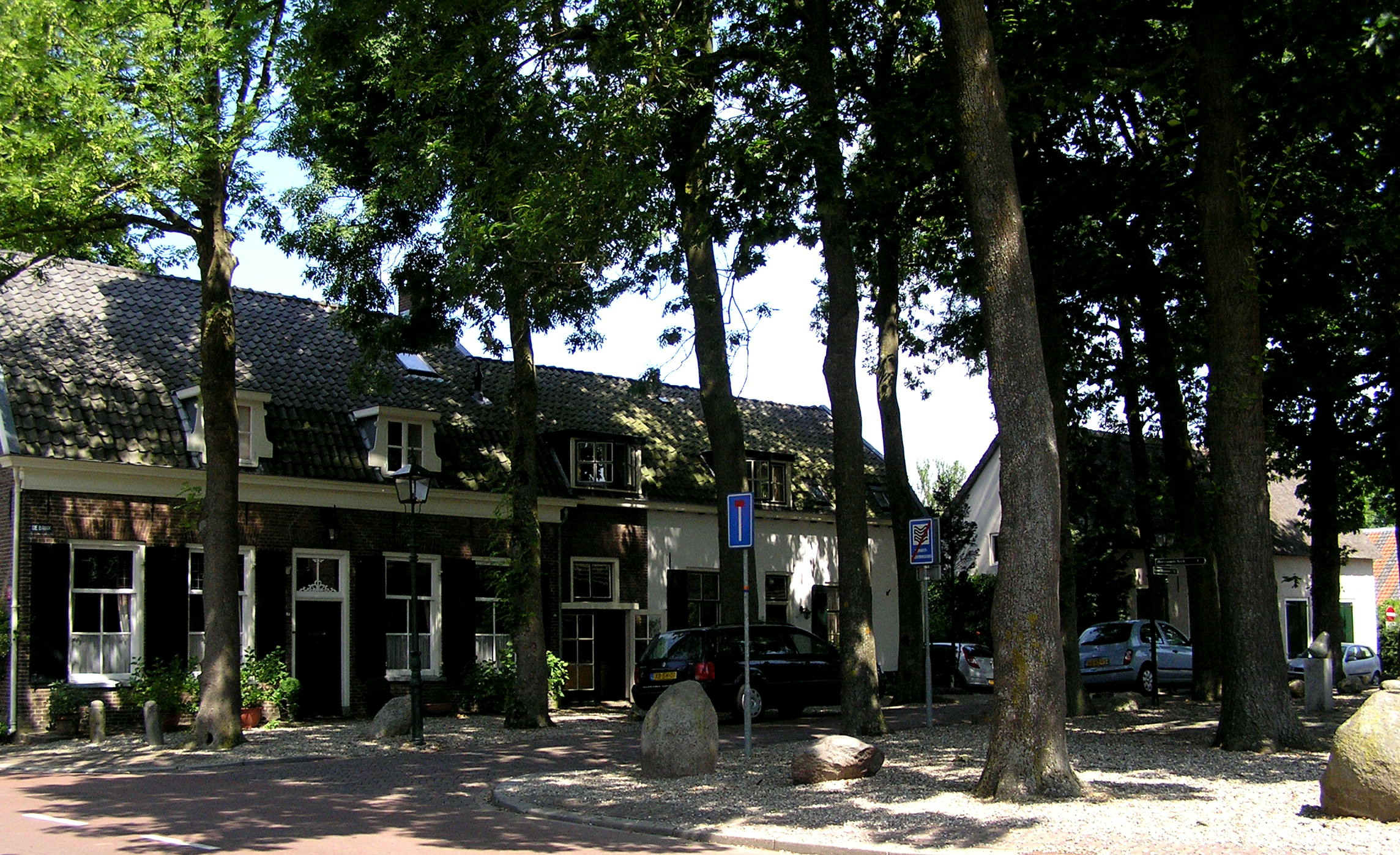 Cothen De Brink 2 samen met nr 1-3-4